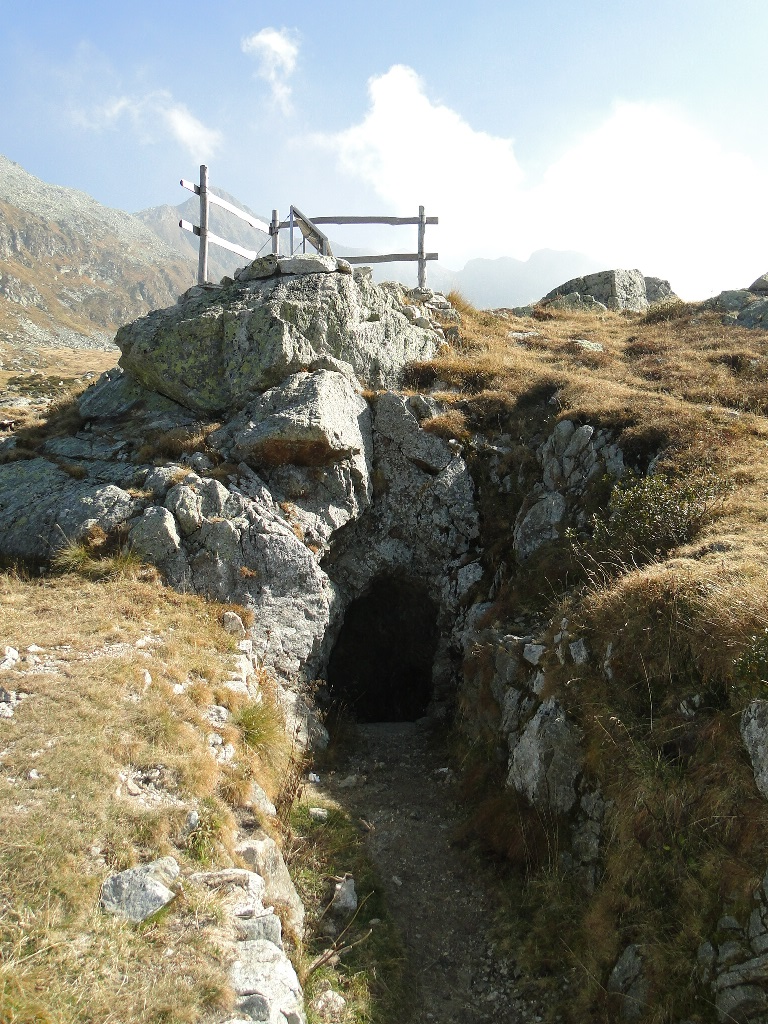 Trincee Linea Cadorna. Passo Dordona, prealpi Orobie